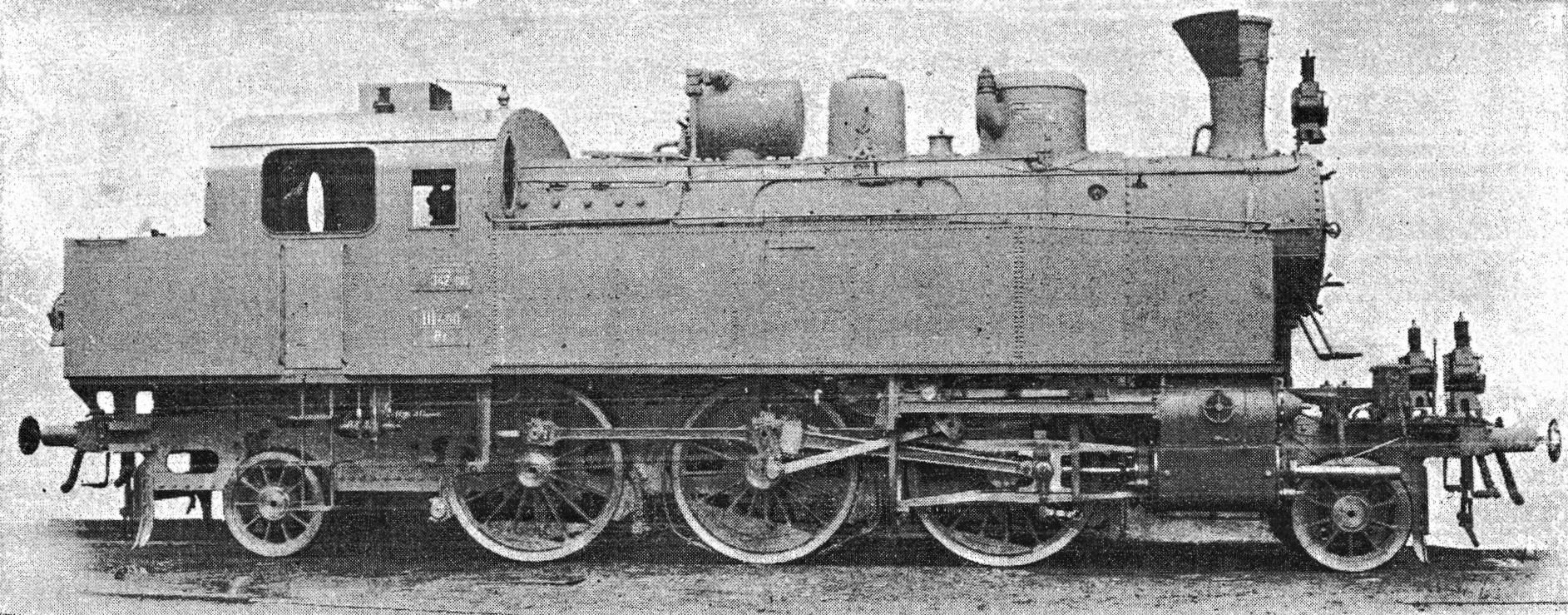 A MÁV 342 sorozatú mozdonya síktűzszekrényes kivitelben